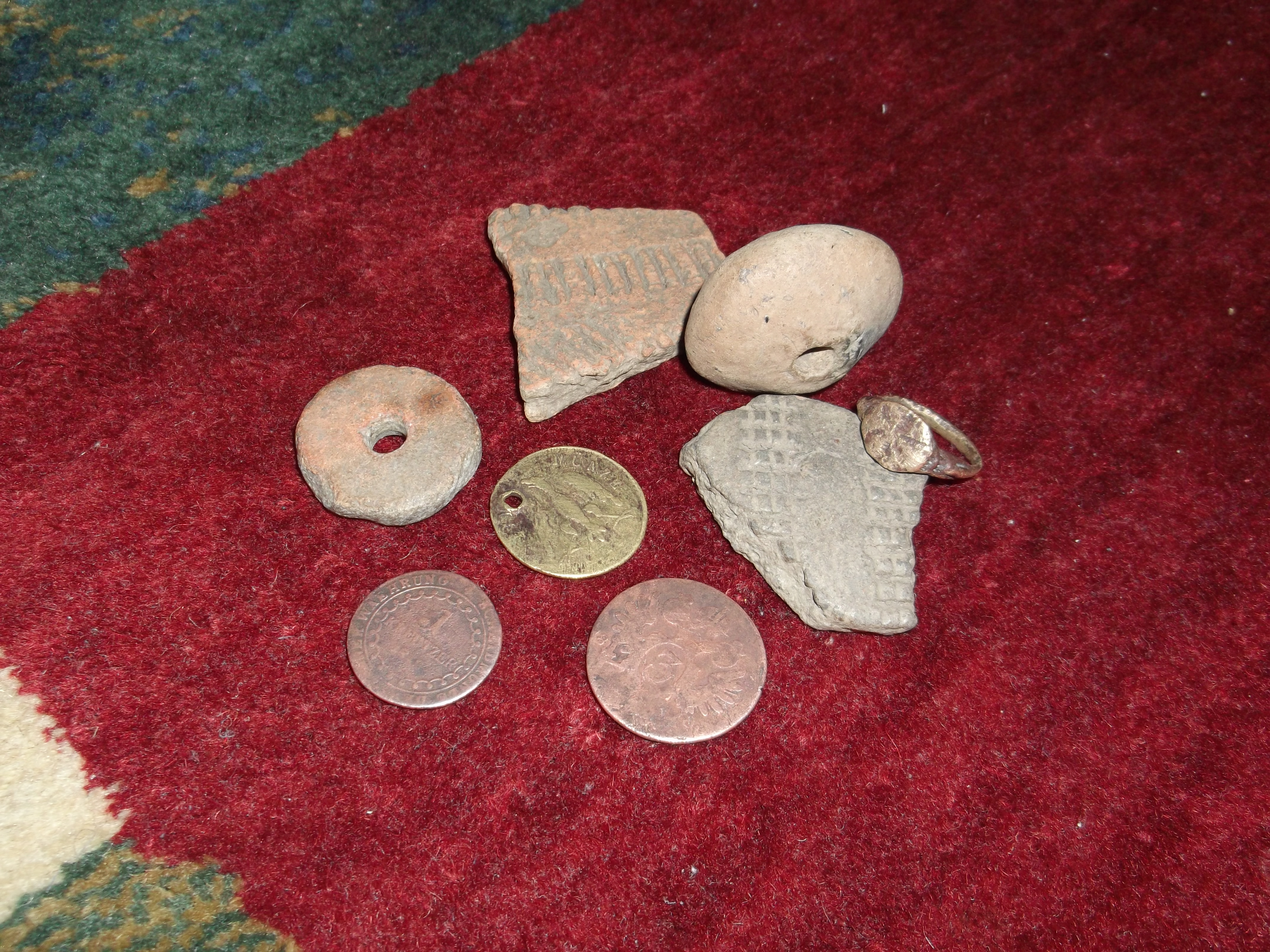 Aruncuta - Obiecte din neolitic ; fragmente de ceramica si fusoiole { alaturi de monede austriece si germane , respectiv inel de bronz